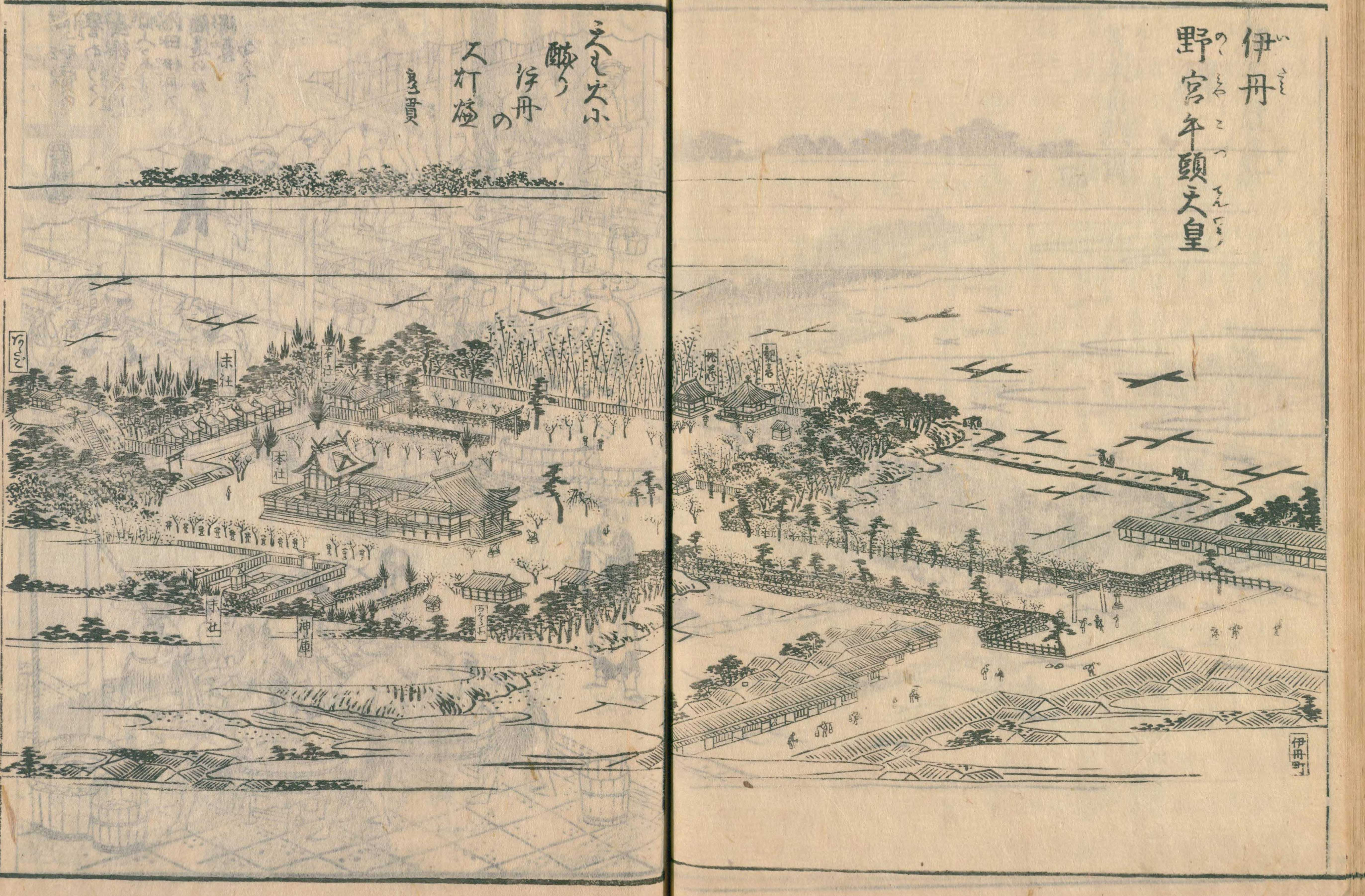 攝津名所圖會の野宮牛頭天王社